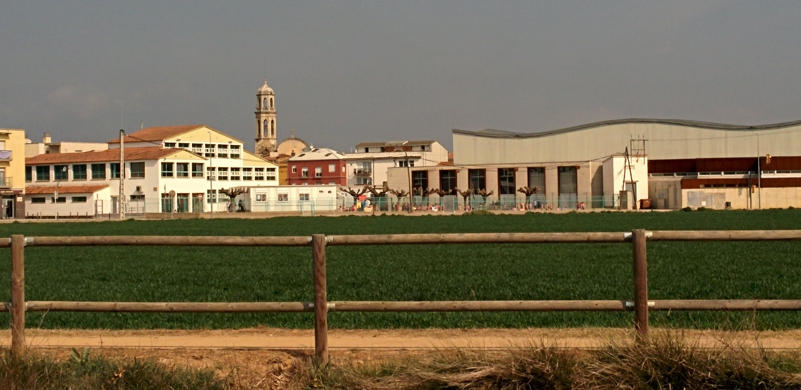 Església parroquial de Sant Esteve de Vilobí (Vilobí d'Onyar)